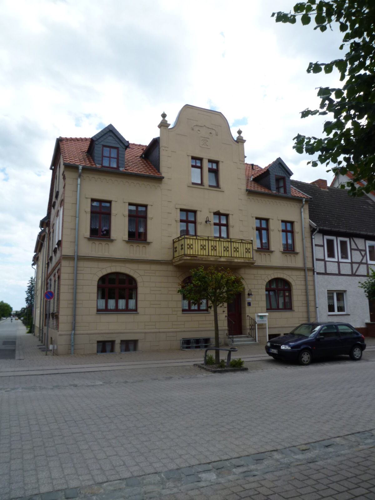 Haus der Begegnung in Calvörde, 2011